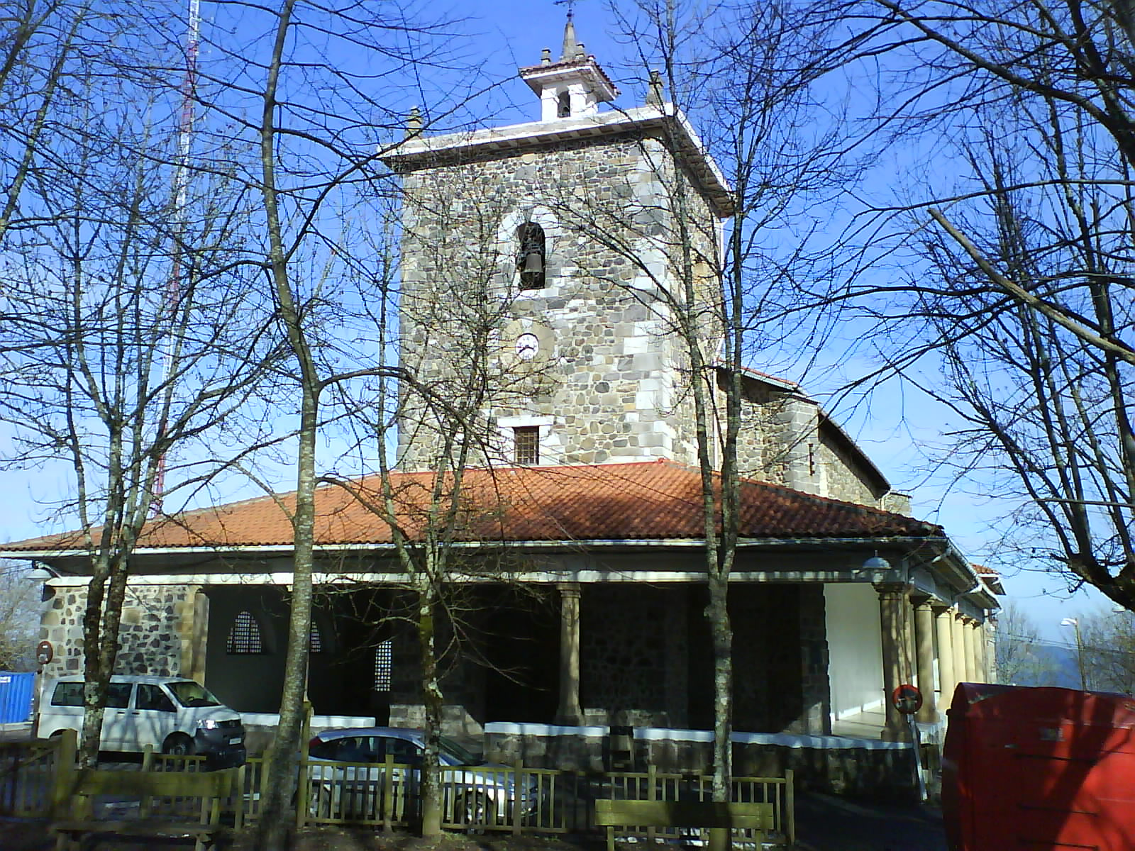 Iglesia de Arrate en Eibar, Guipúzcoa (País vasco) (España).